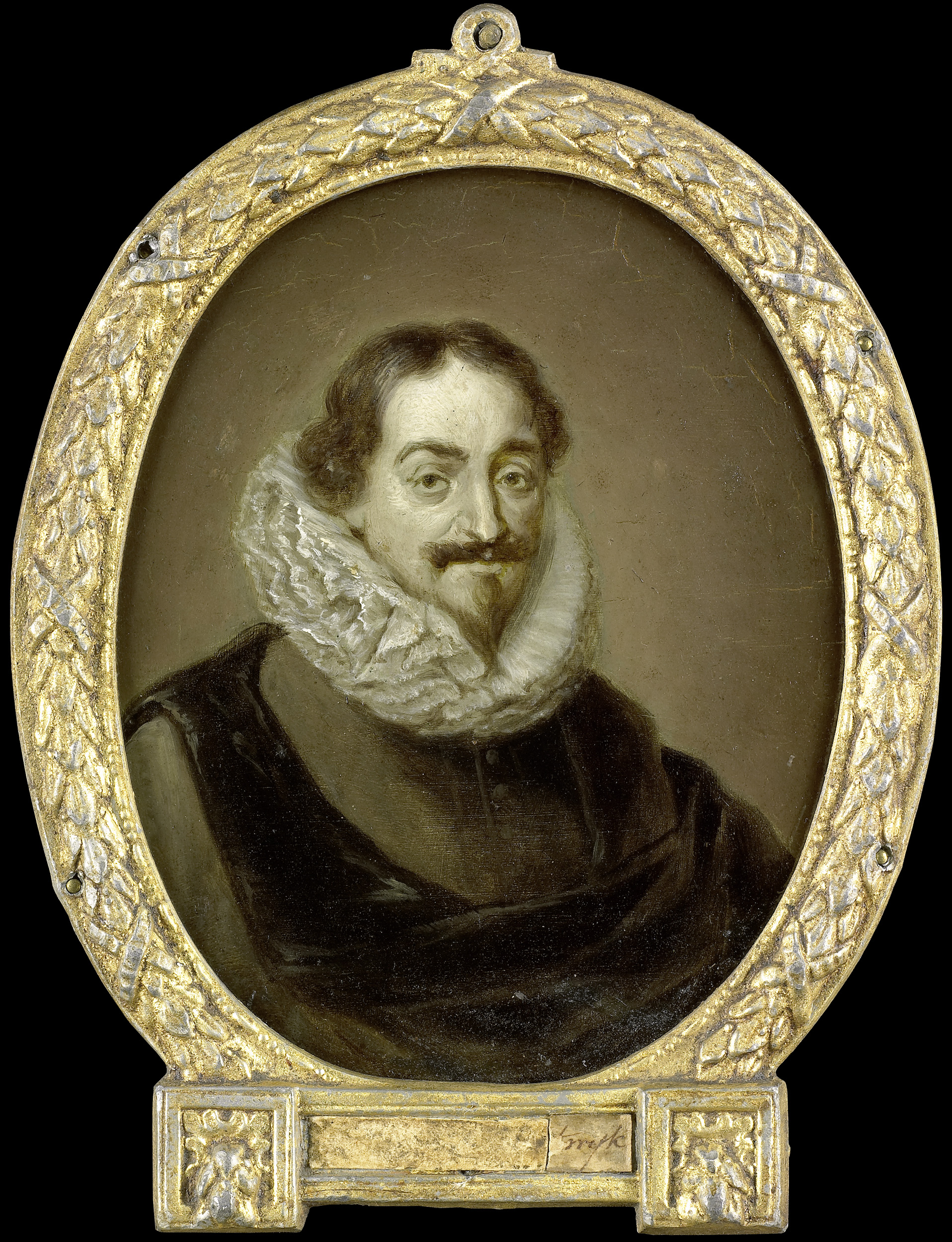 Portret van Jacobus Schotte (ca.1586-1641). Burgemeester van Middelburg. Buste in ovaal, naar rechts. Onderdeel van een verzameling portretten van Nederlandse dichters. Collection: schilderijen; Panpoeticon Batavum